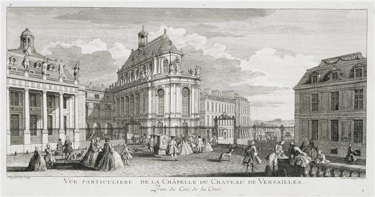 Vue du chevet de la chapelle royale de Versailles vers 1730